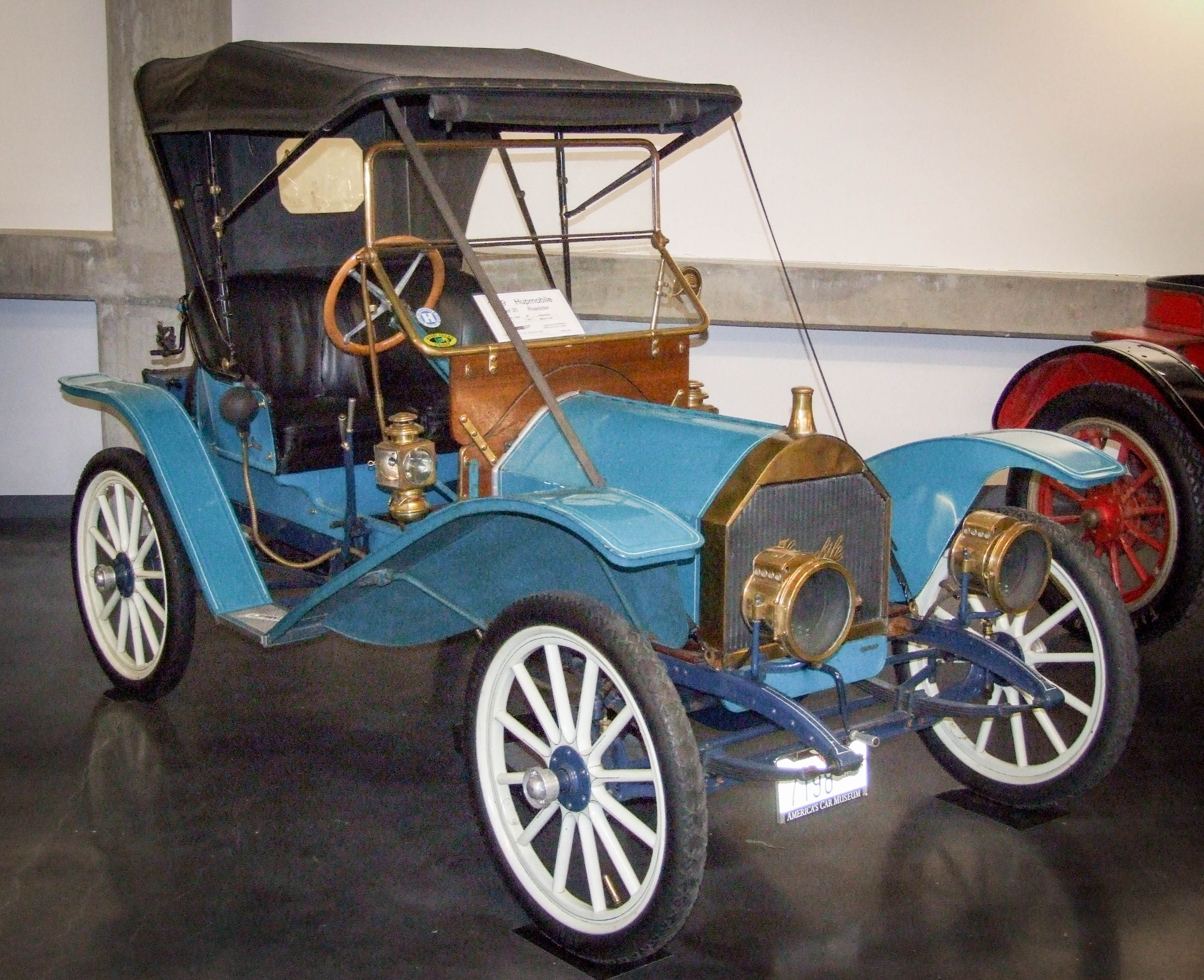 1909 Hupmobile Model 20 roadster